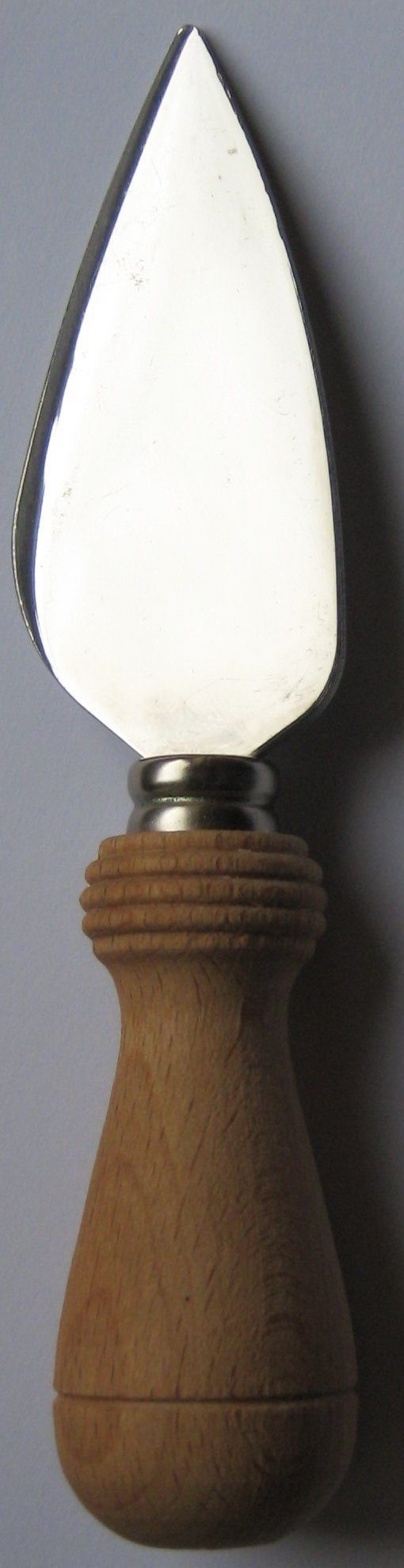 Tagliagrana/Granamesser